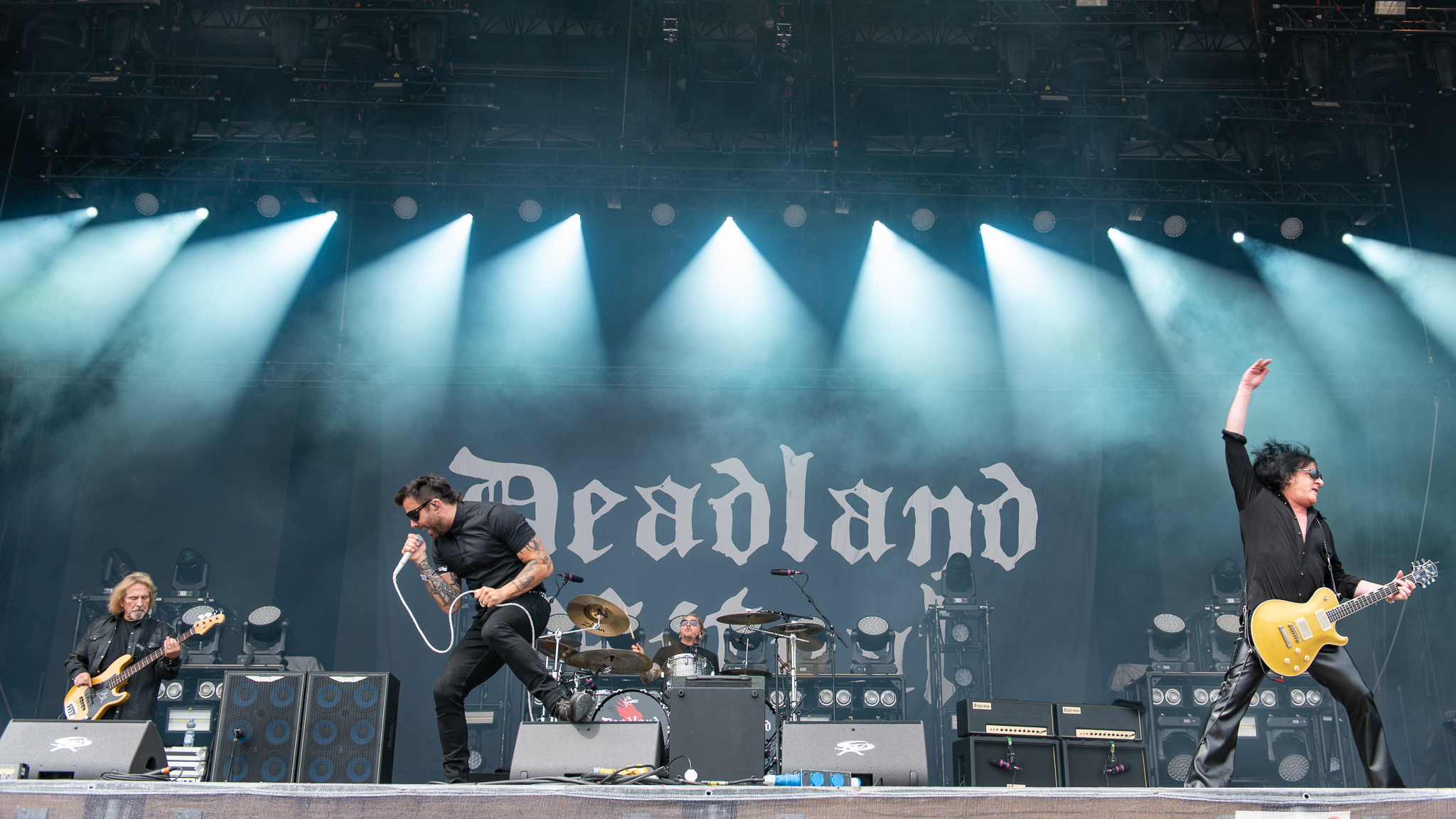 ARGO-Konzerte,Deadland Ritual,Franky Perez,Geezer Butler,Konzert,Livekonzert,Livemusik,Matt Sorum,Musik,RiP,Rock im Park 2019,Steve Stevens,Zeppelin Stage